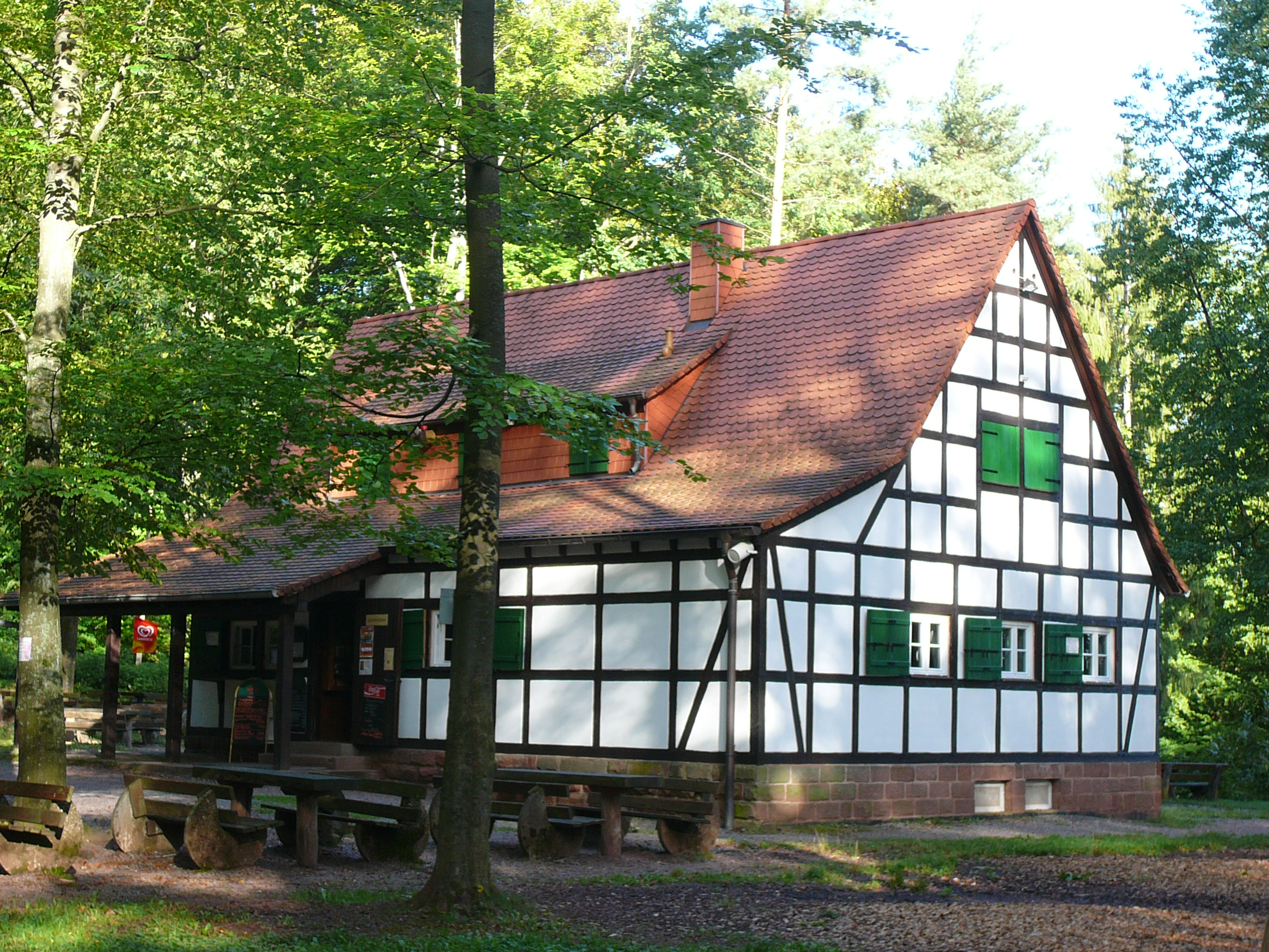 Kletterhütte am Asselstein bei Annweiler